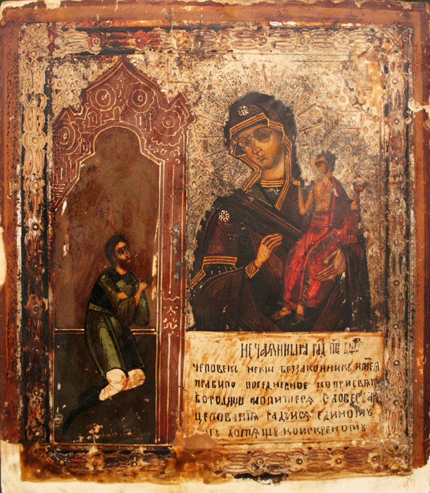 Икона Божией Матери Нечаянная Радость, Беларусь